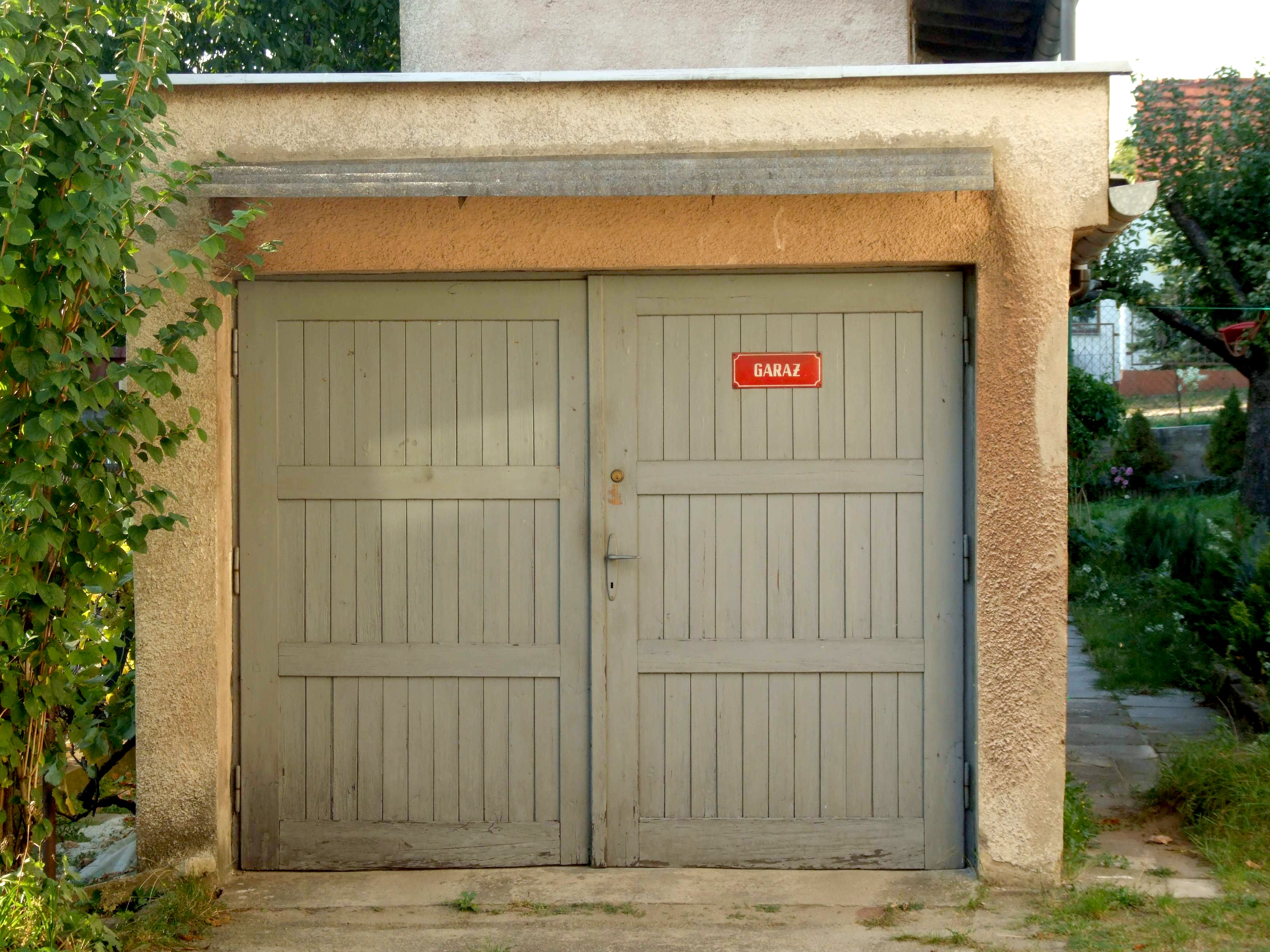 Wzruszająca tabliczka dookreślająca ;) Garaż w okolicach Wieży Braniborskiej w Zielonej Górze. Autor: Mohylek 15:25, 9 paź 2006 (CEST)